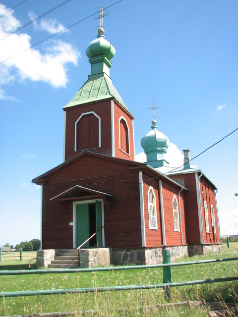 Metsküla church, Metsküla, Saaremaa, Estonia